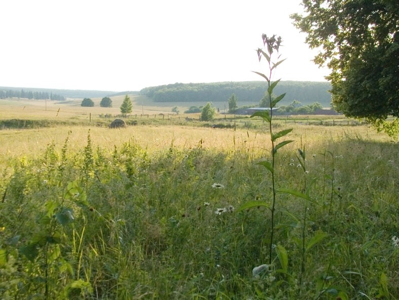 Алшихово